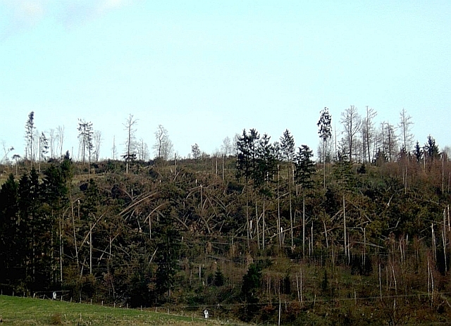 Sturmschaden vom 18. Januar 2007 in Schmallenberg nach dem Orkan "Kyrill", Germany.